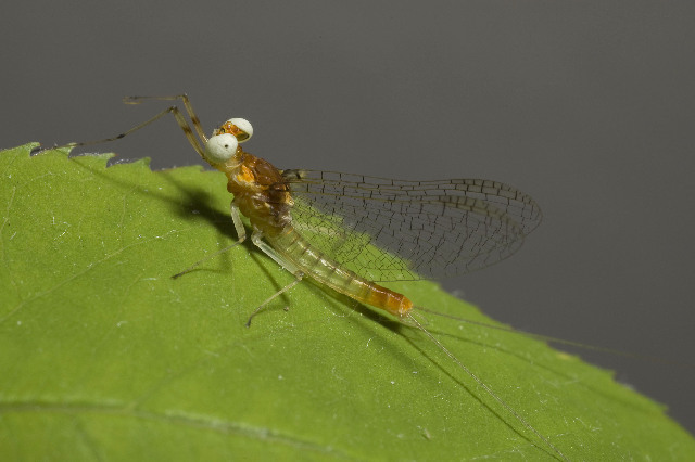 Maccaffertium terminatum